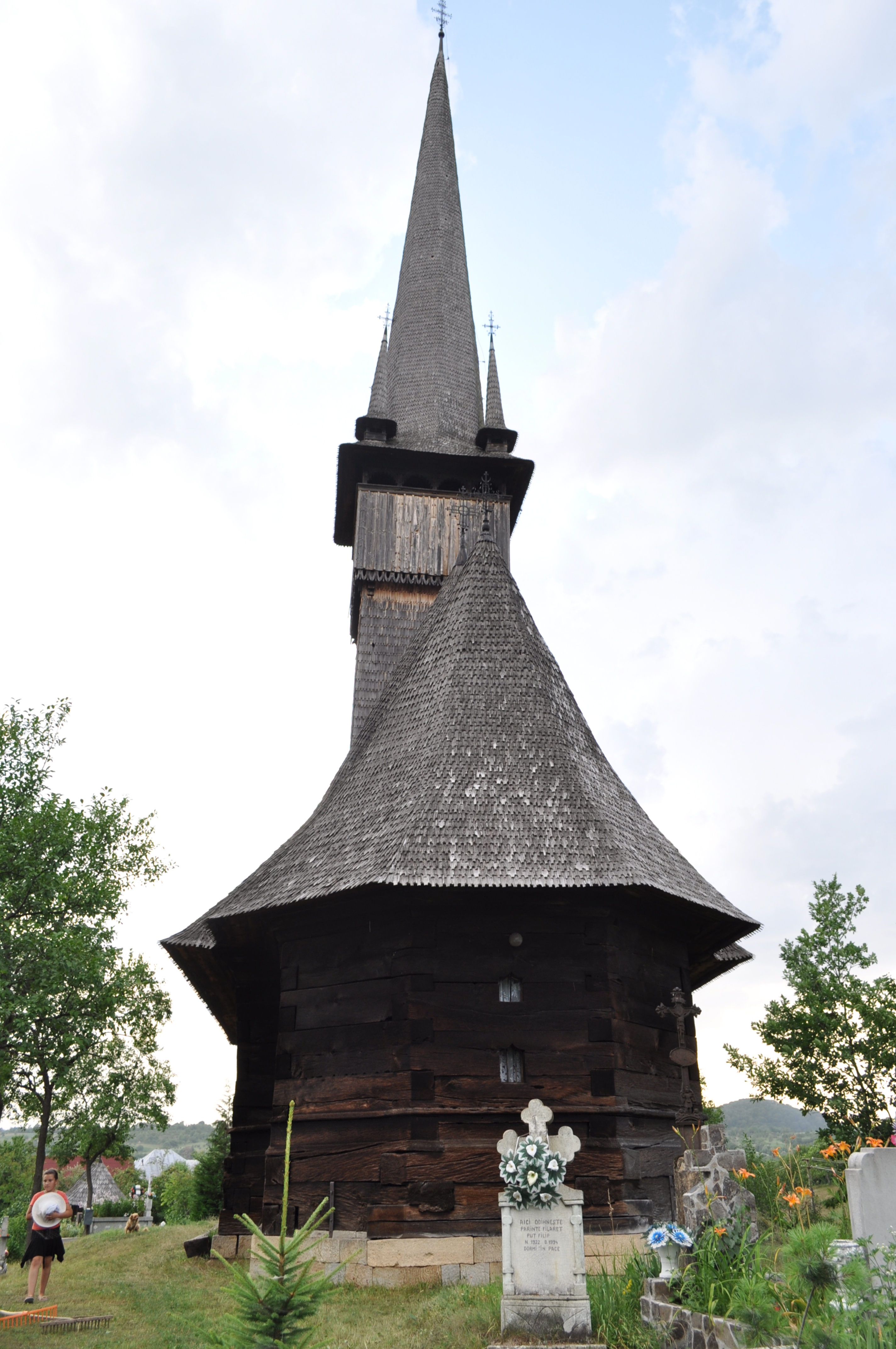 Biserica de lemn "Sfinții Arhangheli Mihail şi Gavril", sat PLOPIŞ; comuna ŞIŞEŞTI